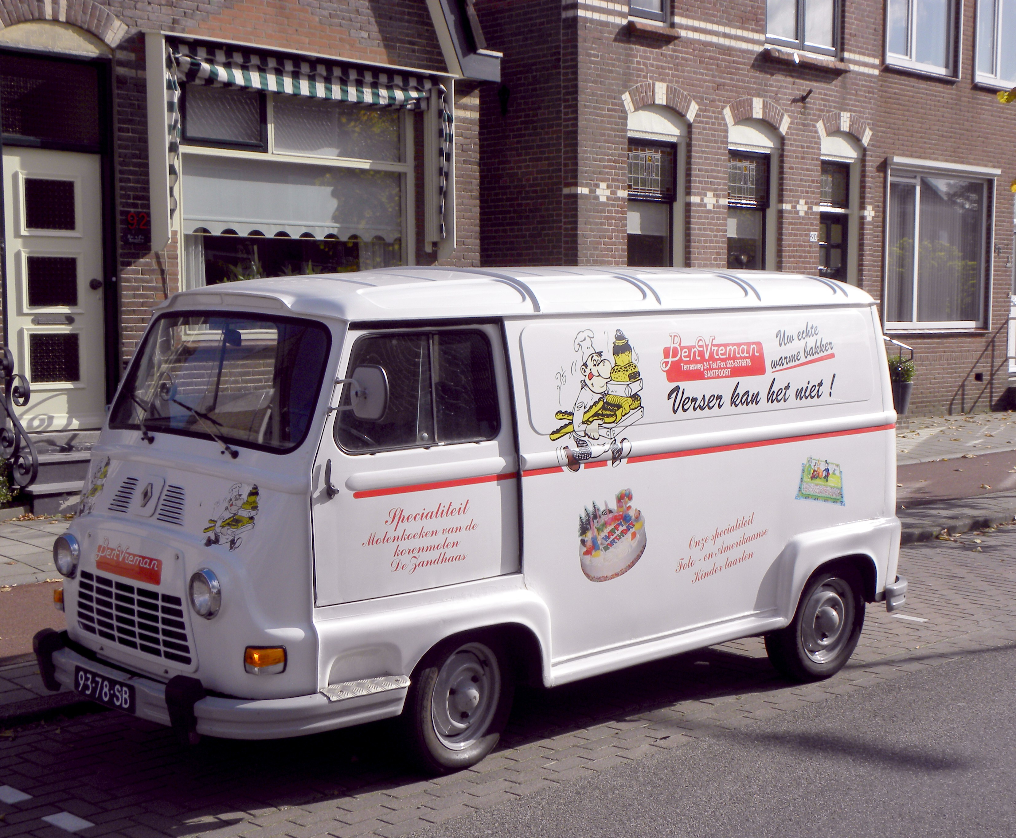 Renault Estafette 800